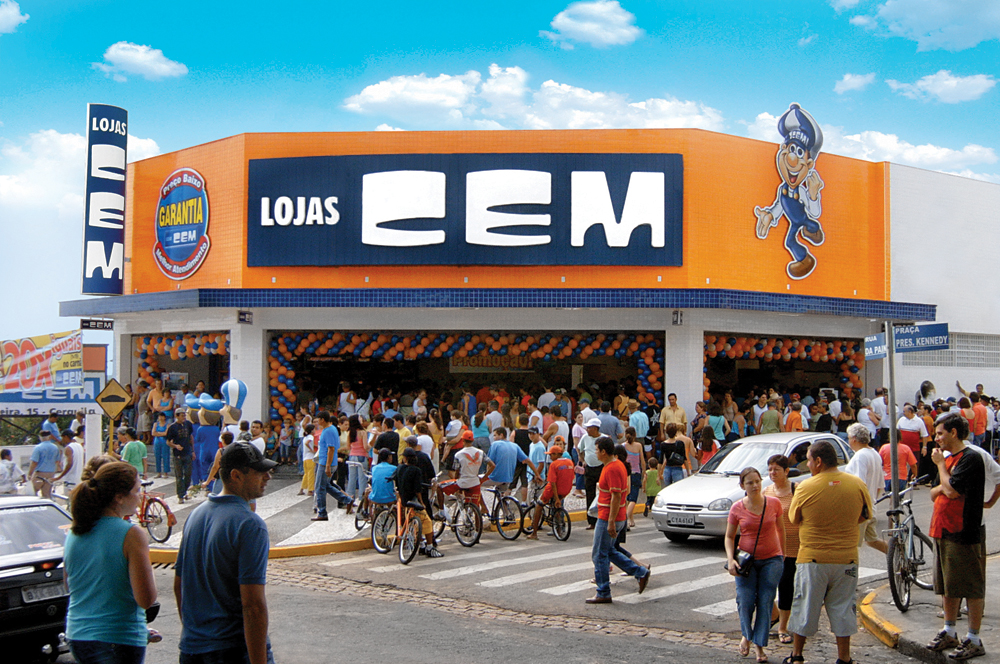 Filial das Lojas Cem no interior de São Paulo, em dia de grande promoção.